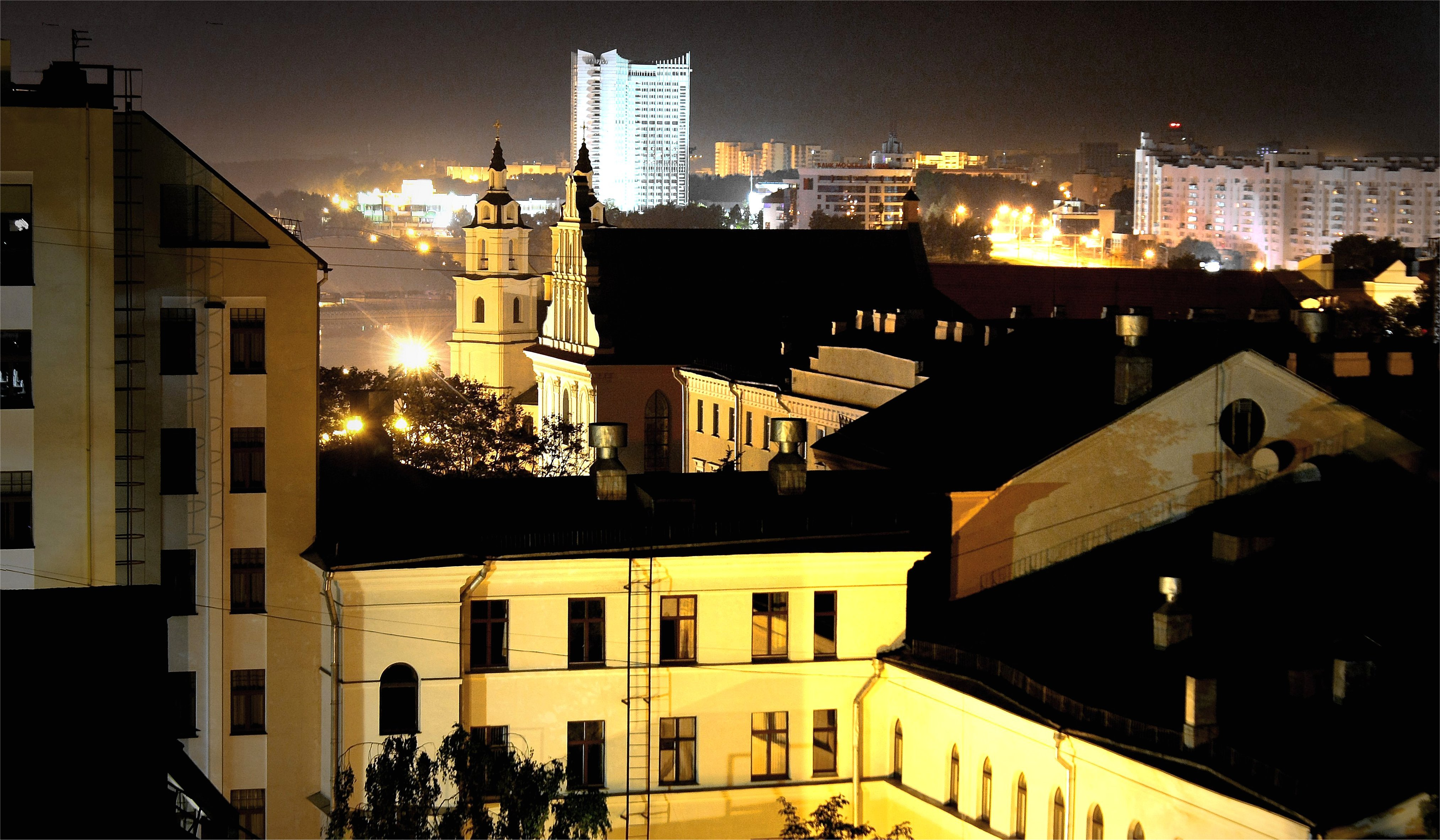 Беларуская (тарашкевіца): Гістарычны цэнтар г. Менску: будынкі і збудаваньні, пляніровачная структура, ляндшафт і культурны пласт. г. Менск This is a photo of Belarusian heritage monument. Reference number: 711Е000001 ( WLM)